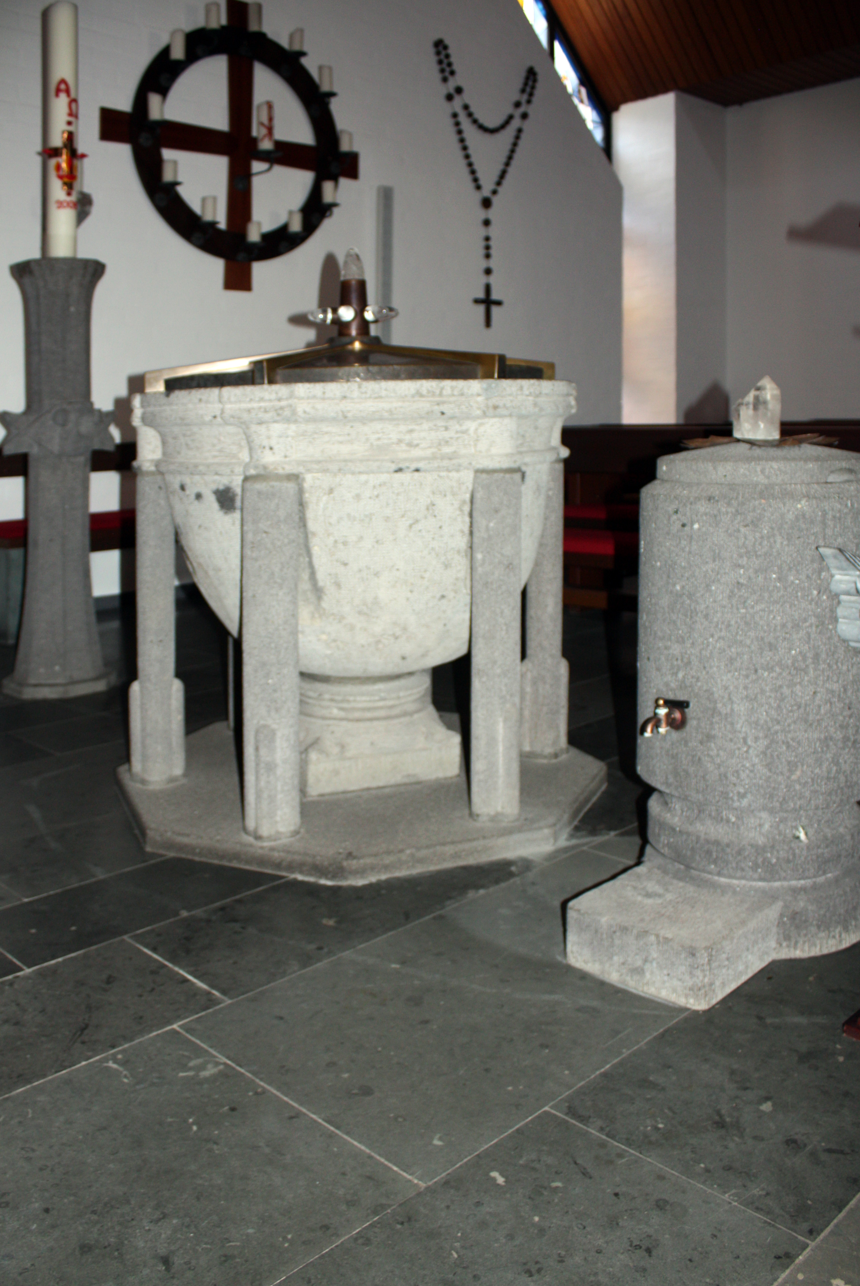 St. Gertrud, Schuld an der Ahr. Taufstein (Basalt) 13. Jahrhundert